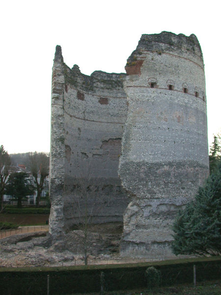 La tour de Vésone, vestige d'un temple gallo-romain, Périgueux, Dordogne, France Object location45° 10′ 46″ N, 0° 42′ 51.7″ E